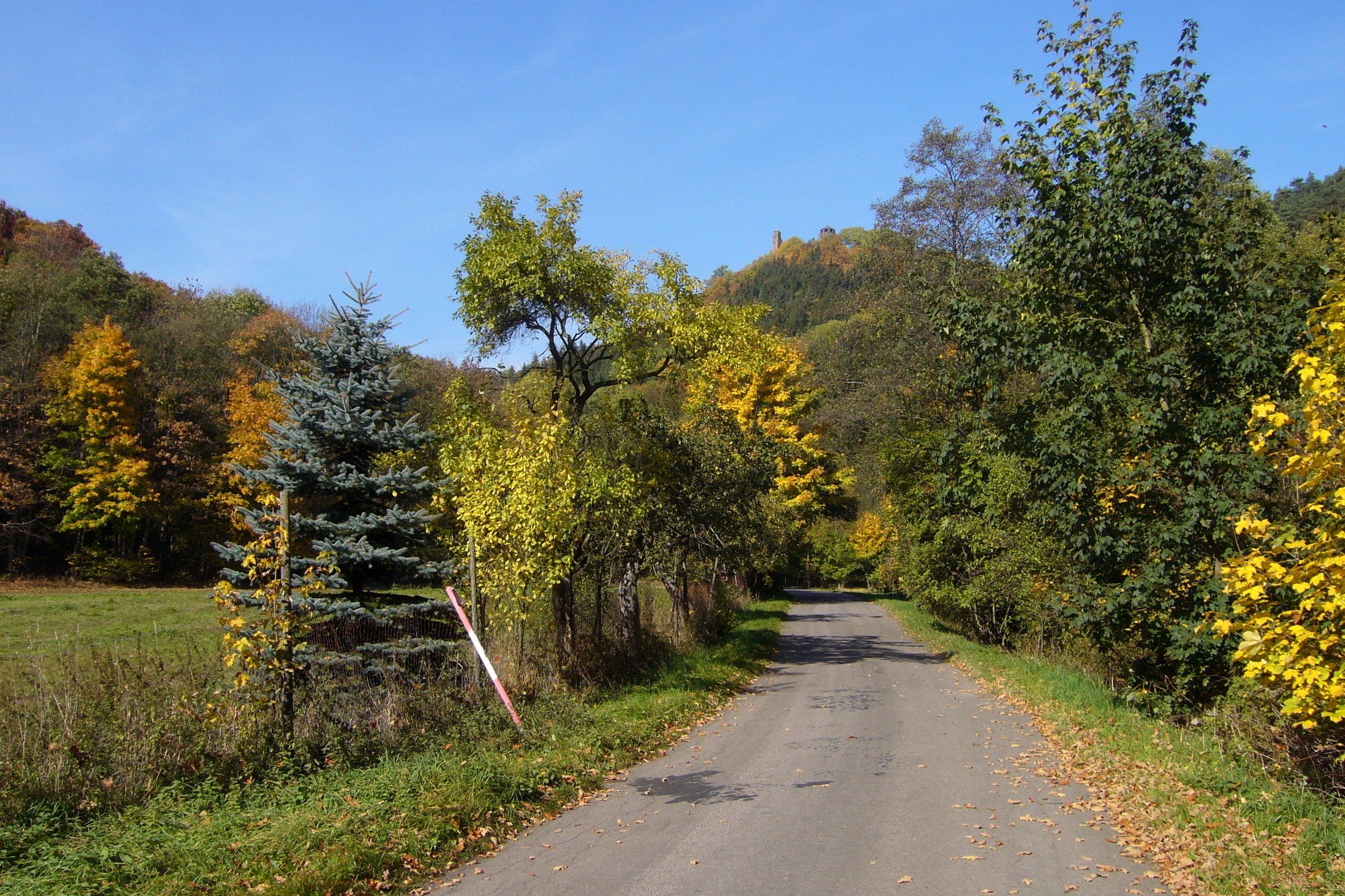 Prunéřovské údolí nad Novou Vískou